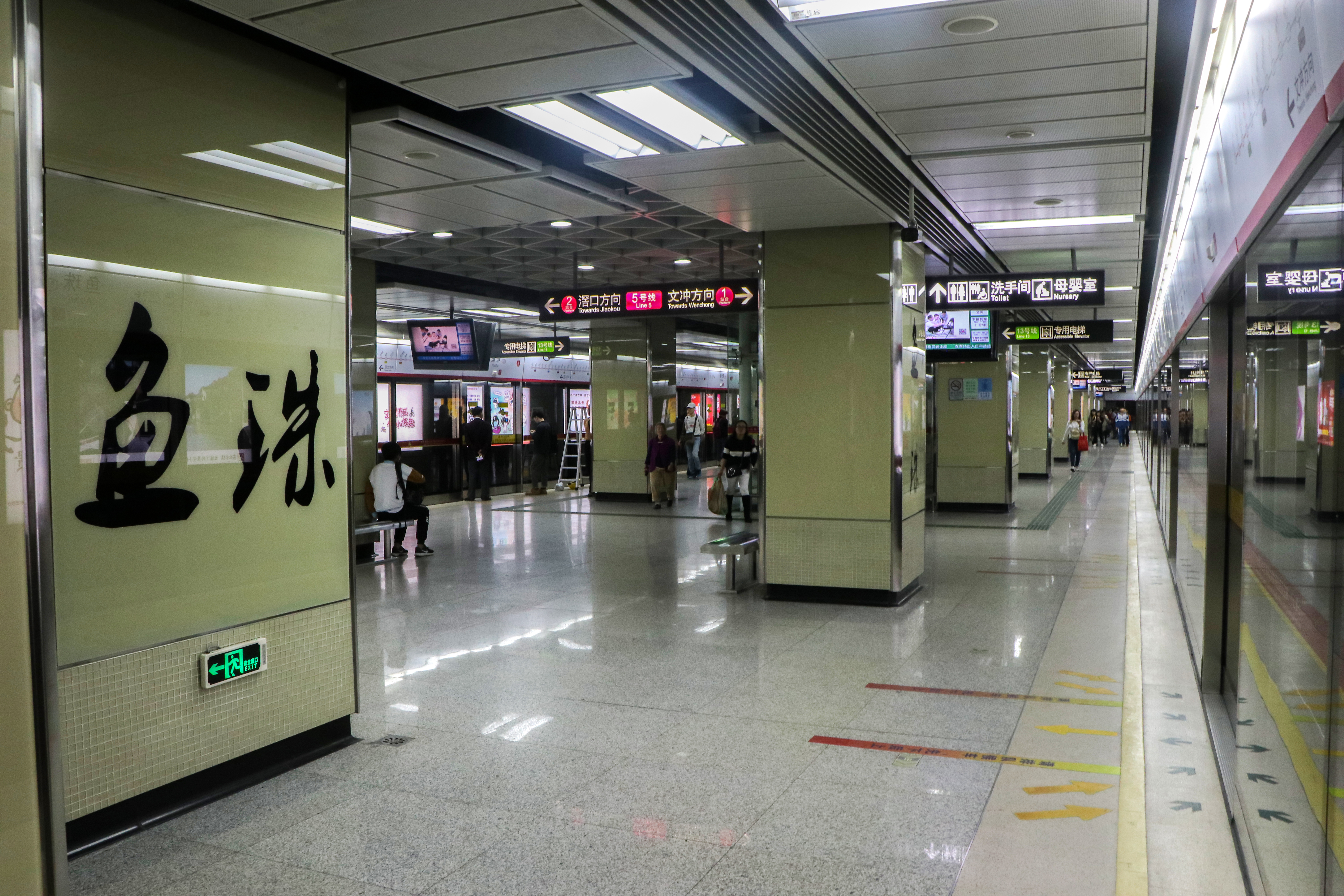 广州地铁鱼珠站